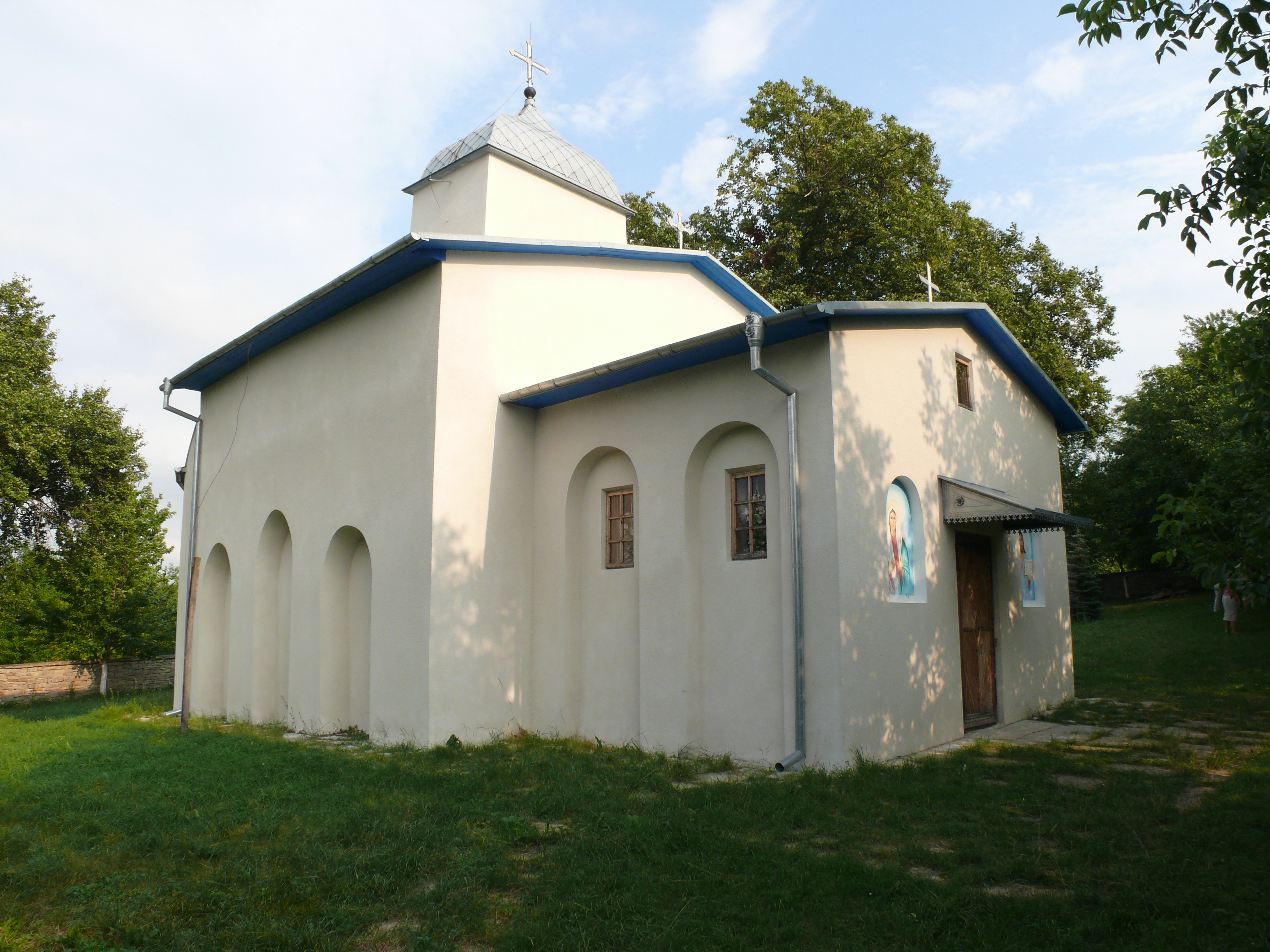 Церква Св. Миколи, с. Збручанське